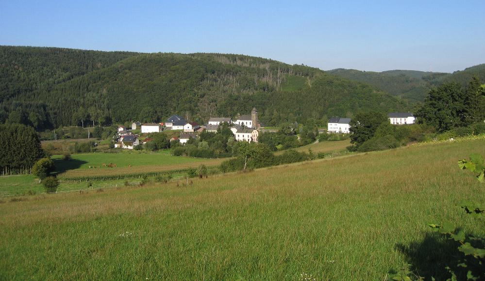 Vue iwwer deen ënneschten Deel vun Draufelt mat der Kierch. Foto vum Pear 17:47, 8 September 2006 (UTC) 08.09.2006. Draufelt